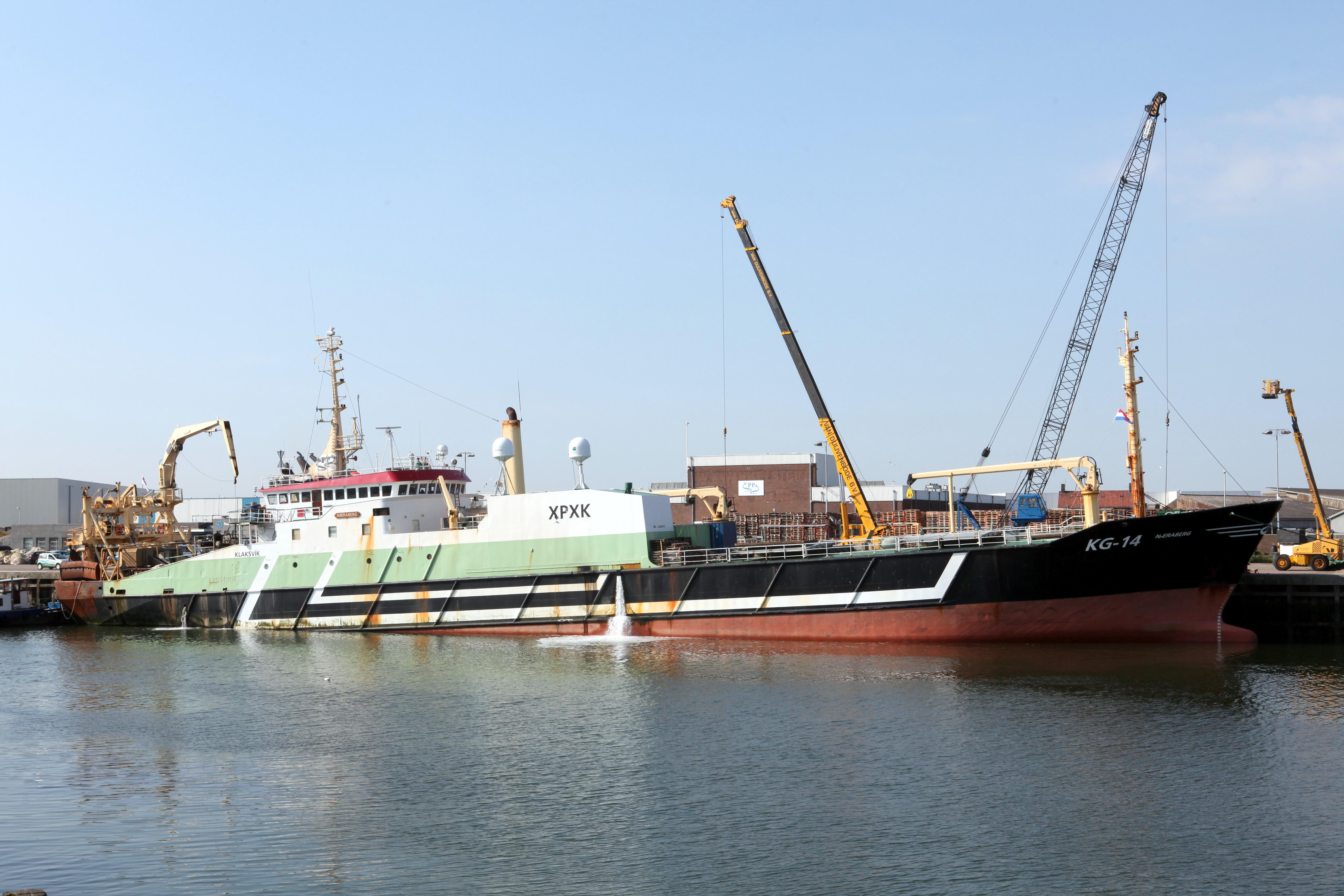 KG-14 Næraberg IMO 8209171, at Klaksvik built 1983